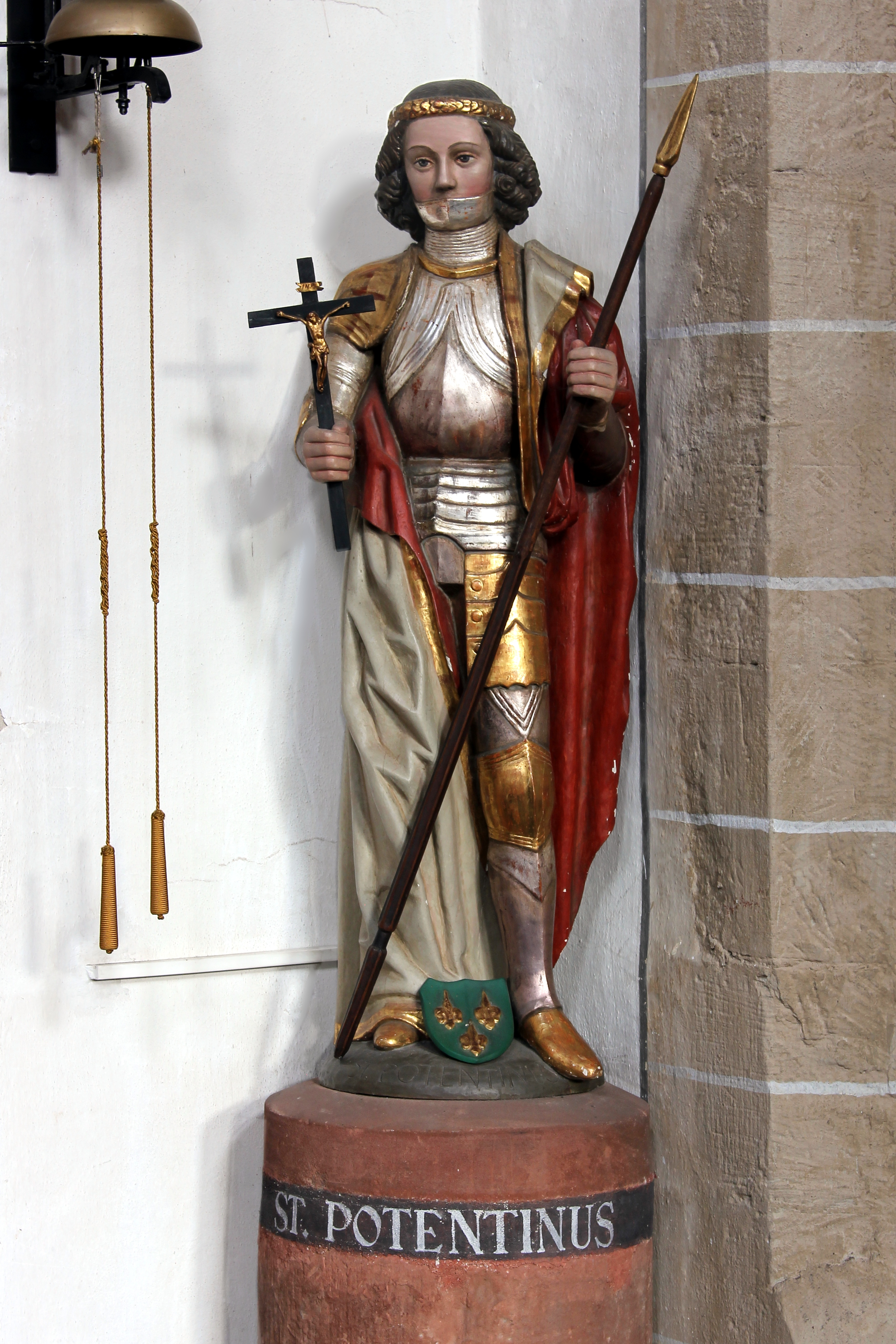 Statue des hl. Potentinus in der ehemaligen Stiftskirche St. Castor in Karden